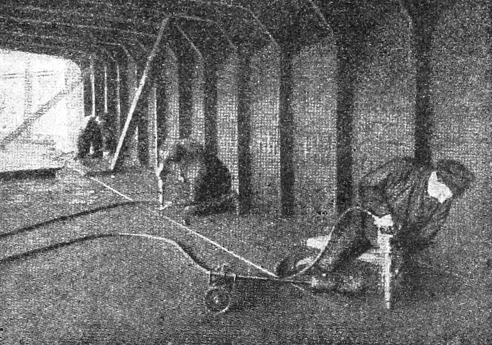 Это изображение было использовано для иллюстрирования статьи «Заклепки в судостроении» опубликованной в десятом томе «Военной энциклопедии», который был издан книгоиздательским товариществом И. Д. Сытина в 1912—1913 гг. в столице Российской империи городе Санкт-Петербурге.